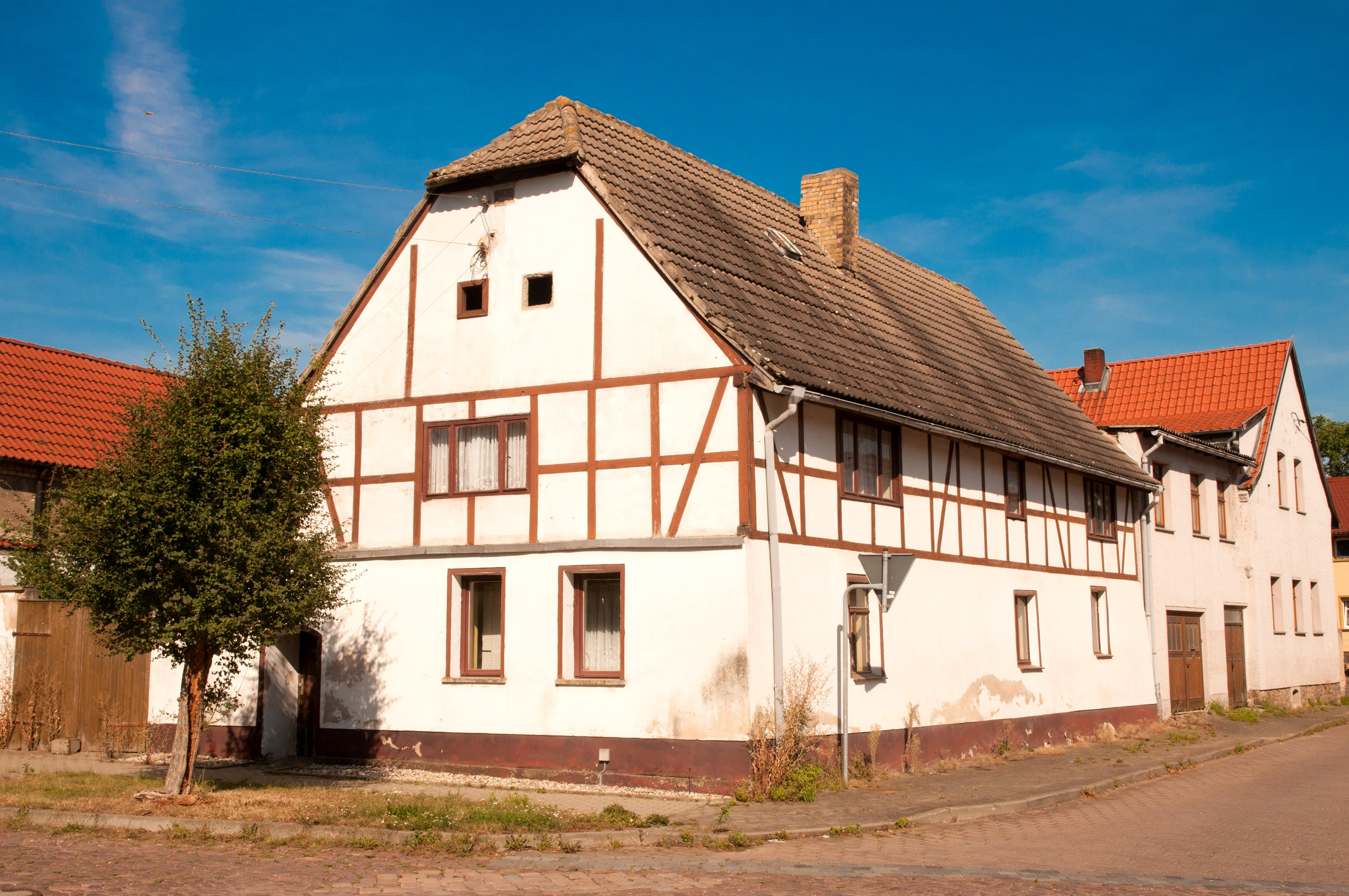 Christian-Reuter-Platz 3, Petersberg (Saalekreis), OT Kütten